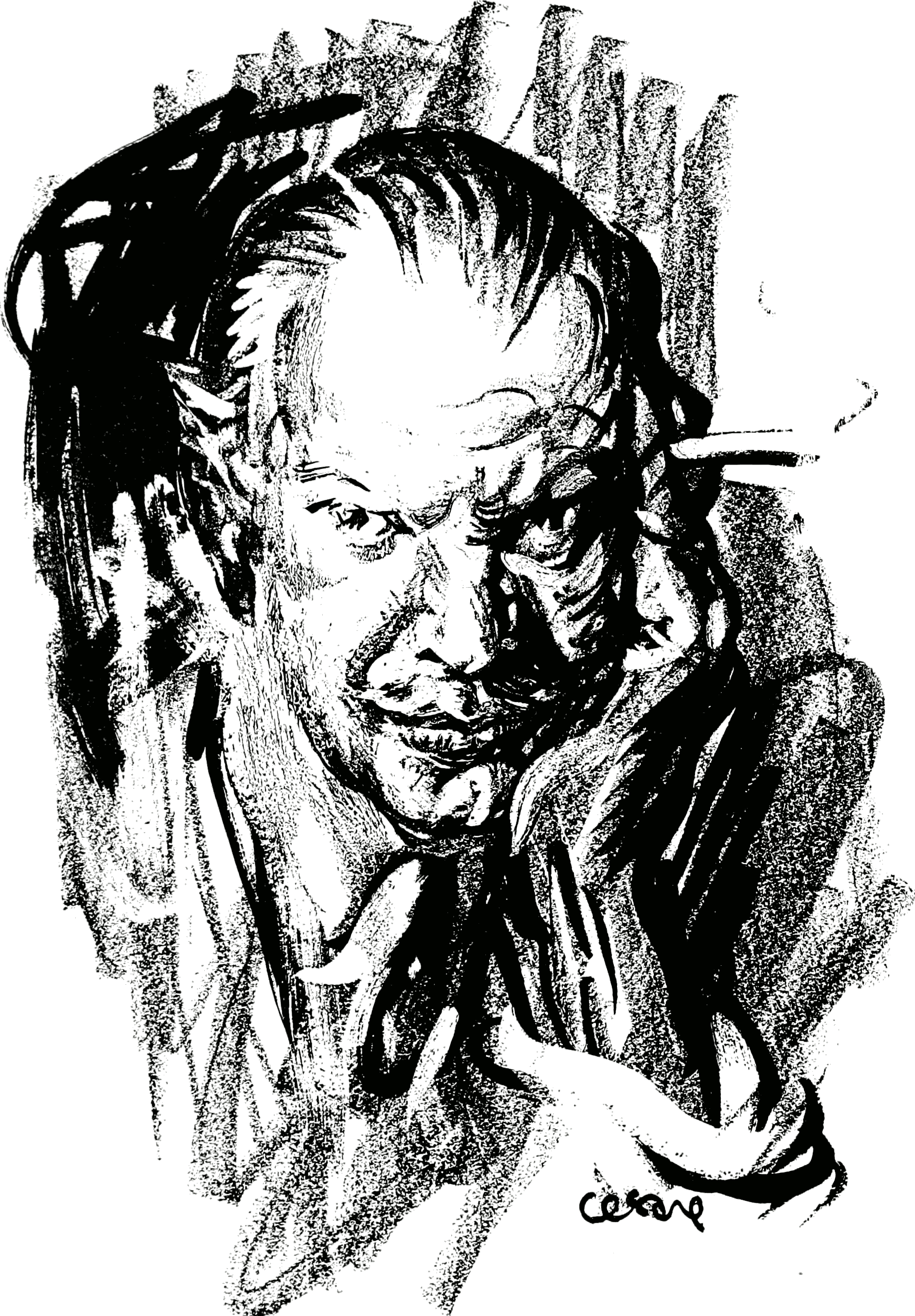 Oscar Cesare self-portrait